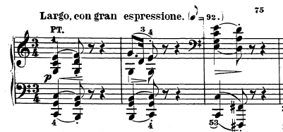 Compassos iniciais do segundo movimento da Sonata Op. 7 de Beethoven